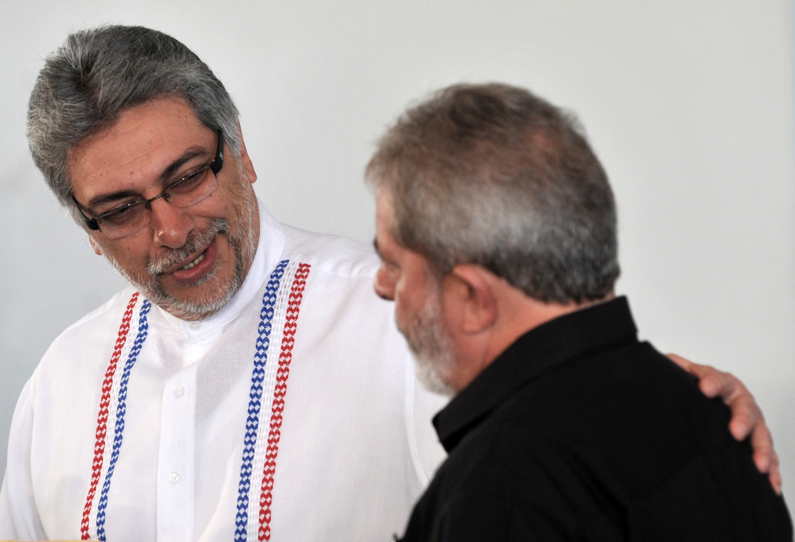 Brasília - Os presidentes Luiz Inácio Lula da Silva e Fernando Lugo chegam para entrevista coletiva antes de embarcar para Campo Grande (MS)